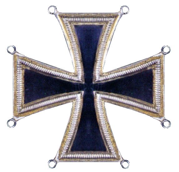 Kulmer Kruis 1813